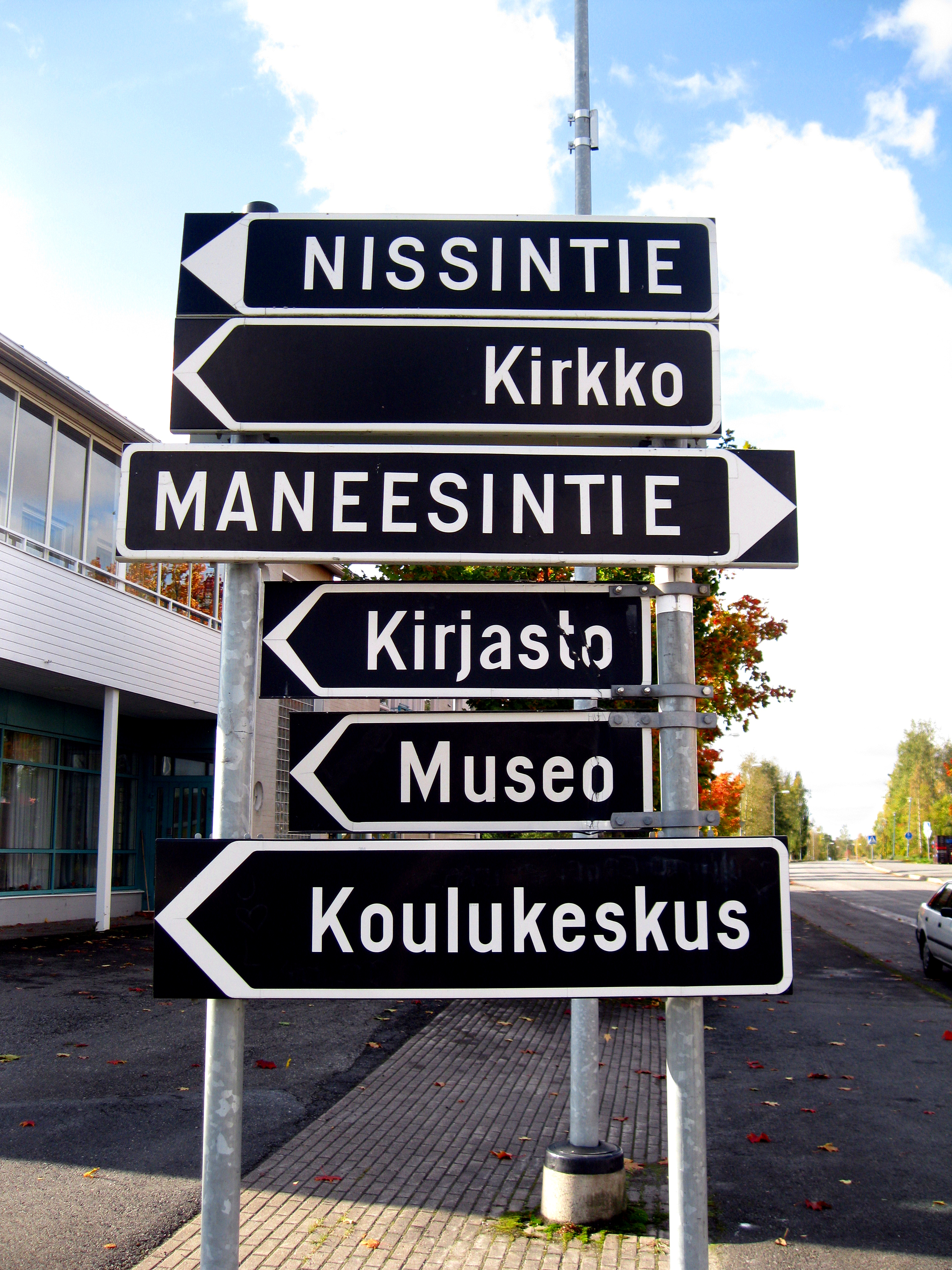 Opastetauluja Lappajärven Kirkonkylässä, 2014.